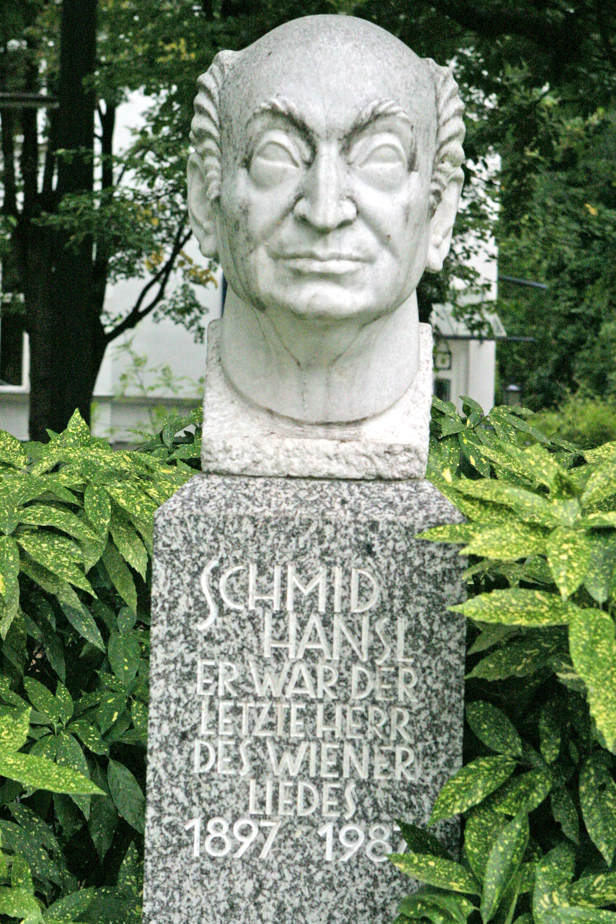 Hansi Schmid - Denkmal